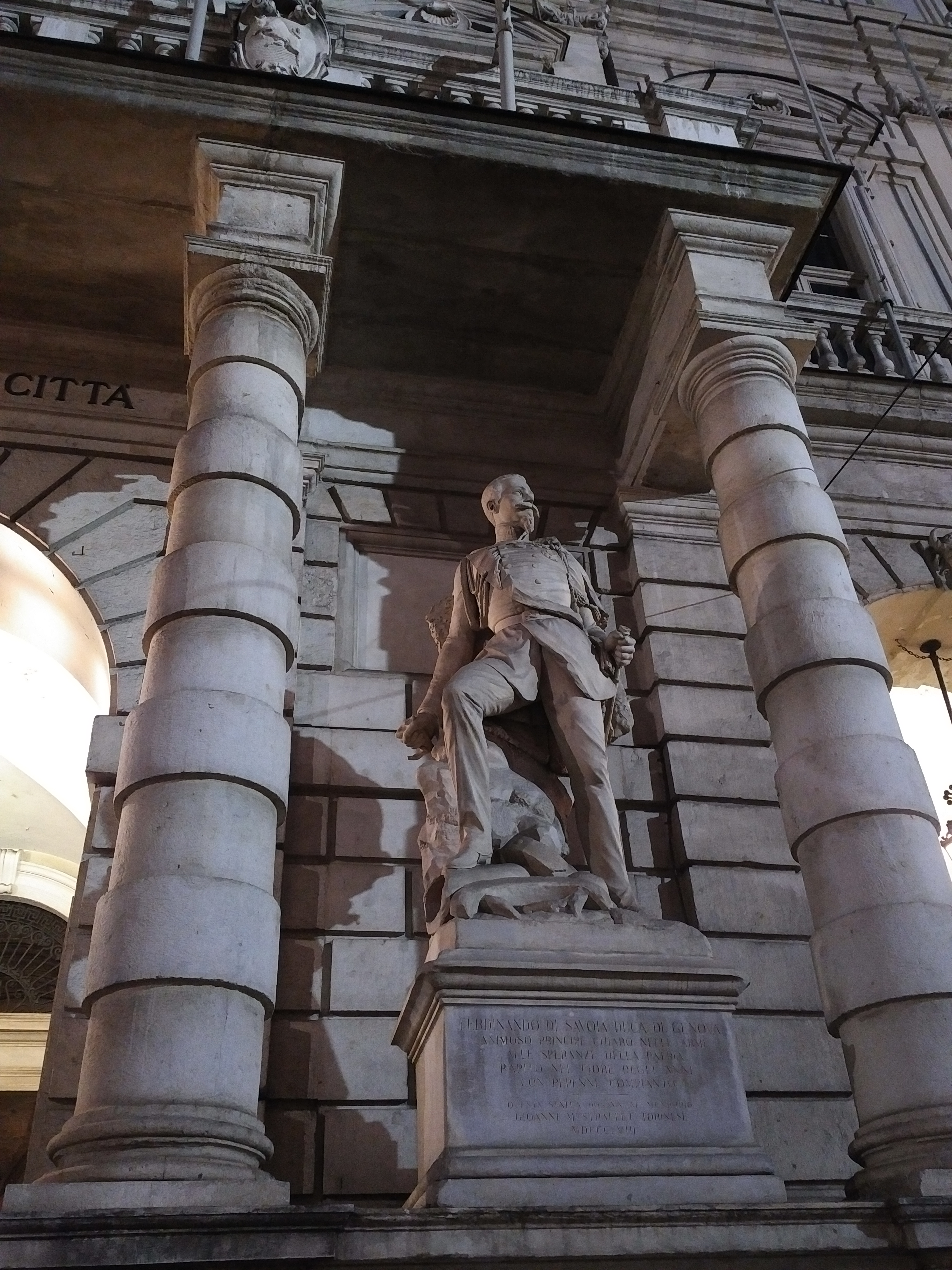 Il Palazzo Civico di Torino, Ferdinando di Savoia.